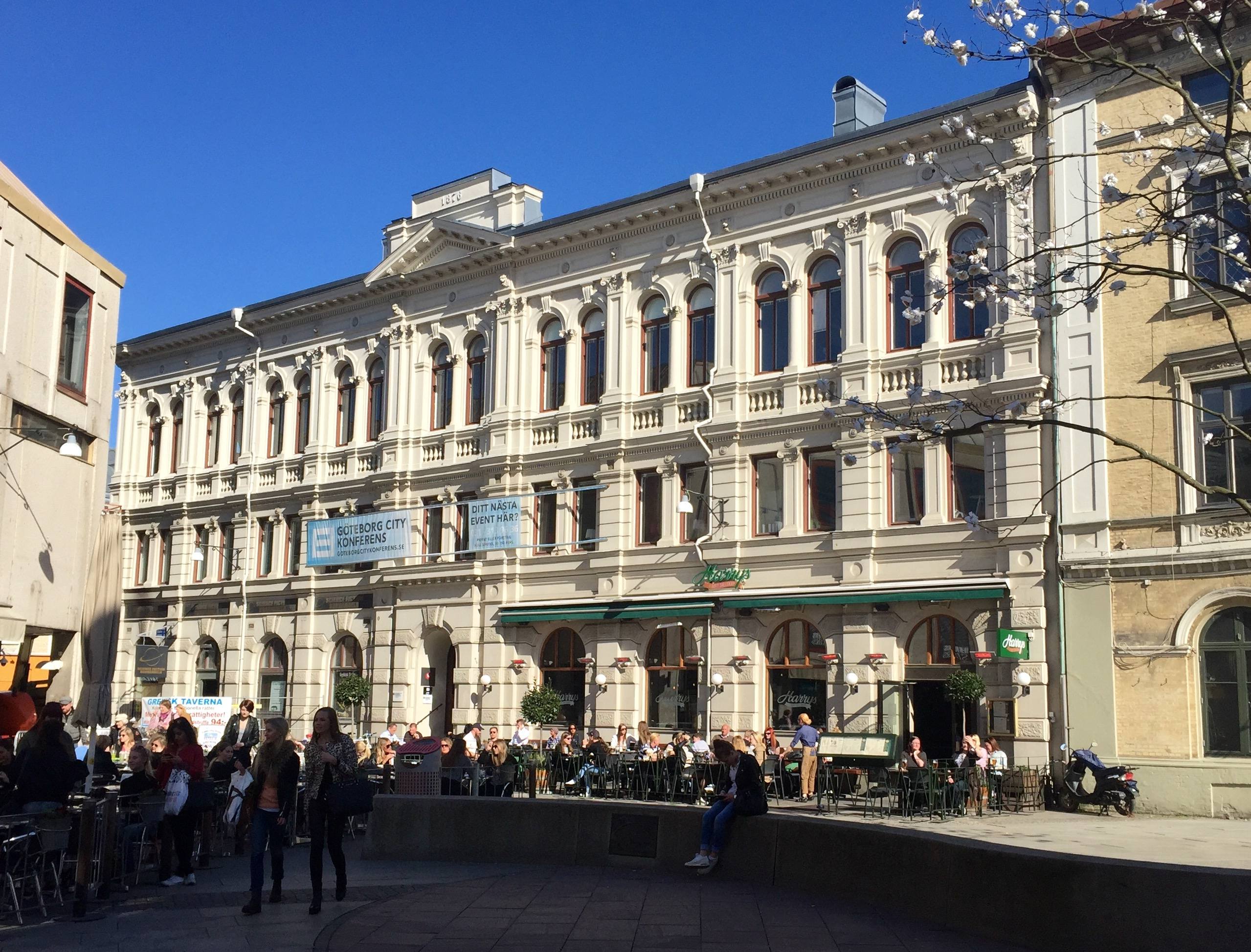 Östra larmgatan 16, Göteborg. August Abrahamsons handelshus. Byggnadsår 1878. Arkitekt: Adrian C Peterson